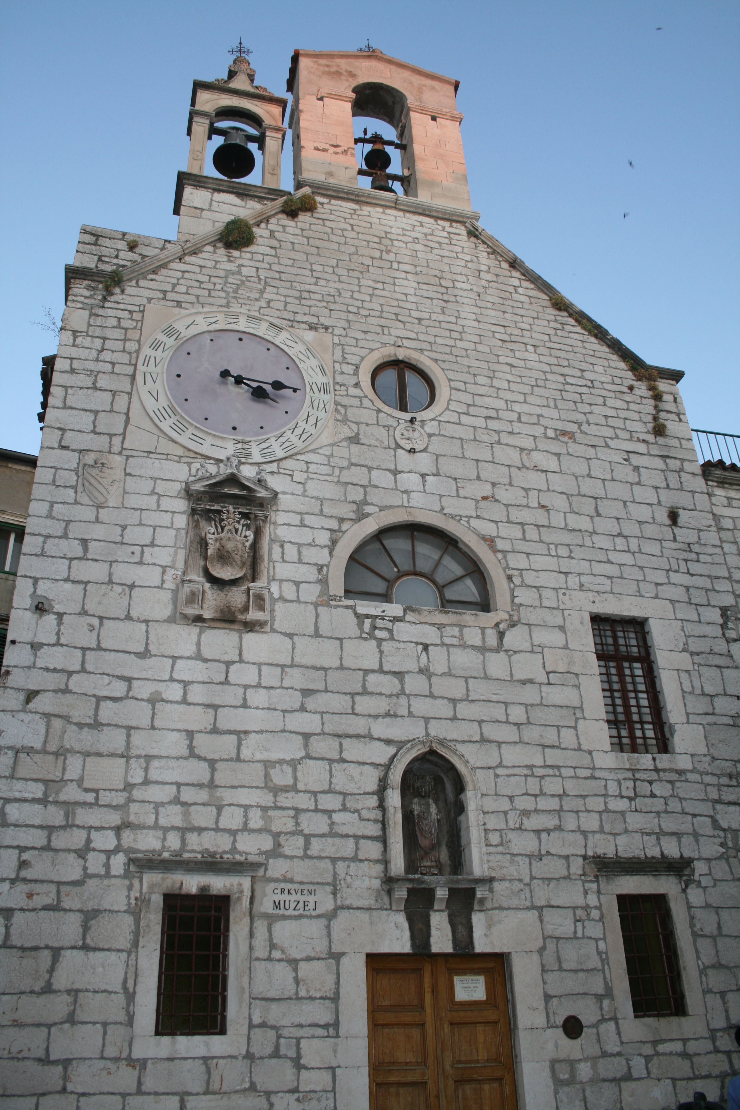 Crkveni Muzej. Sibenik. Croàcia.